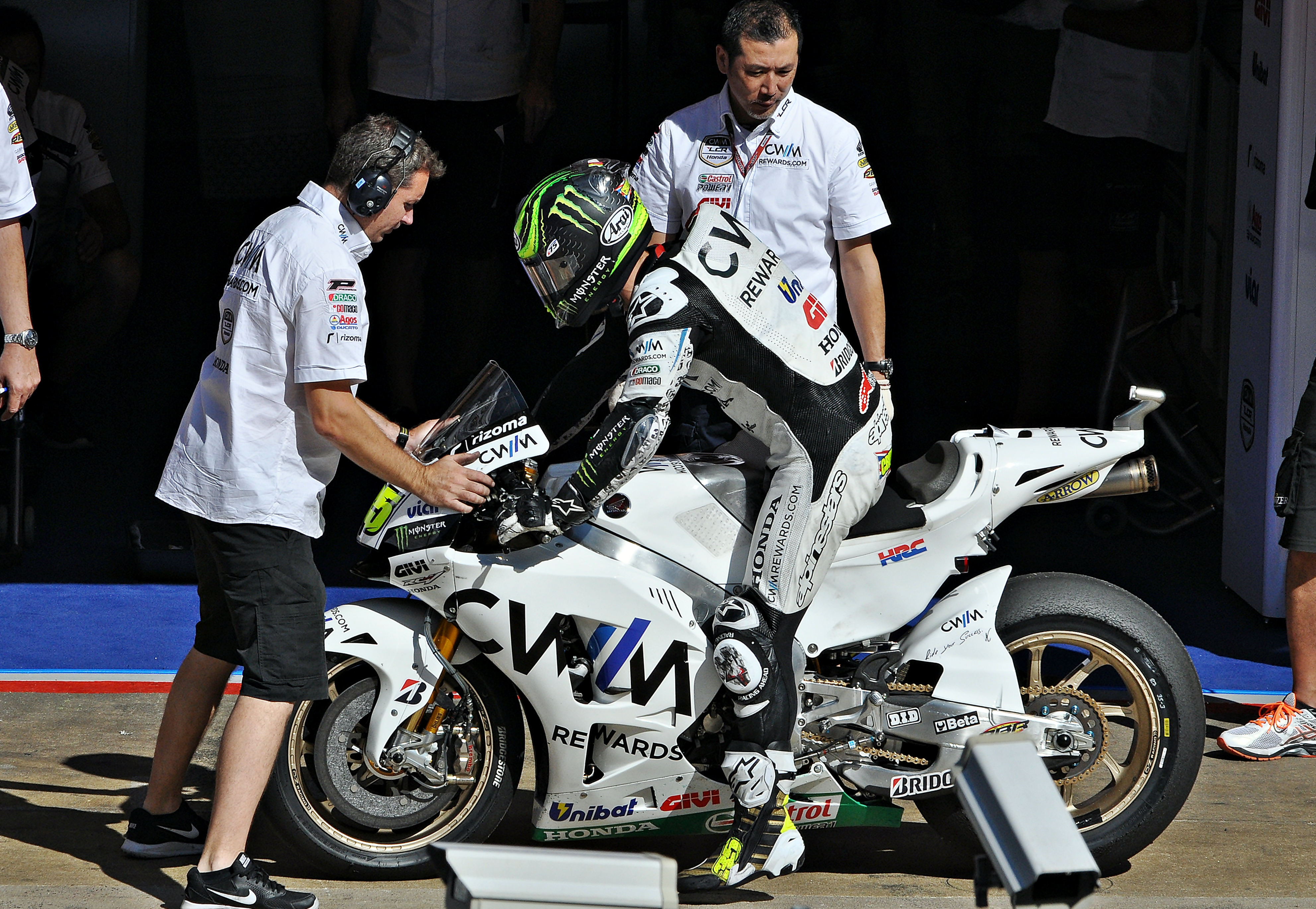 gran premio de cataluña